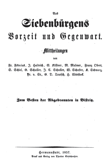 Title Page of Aus Siebenbürgens Vorzeit und Gegenwart (1857)